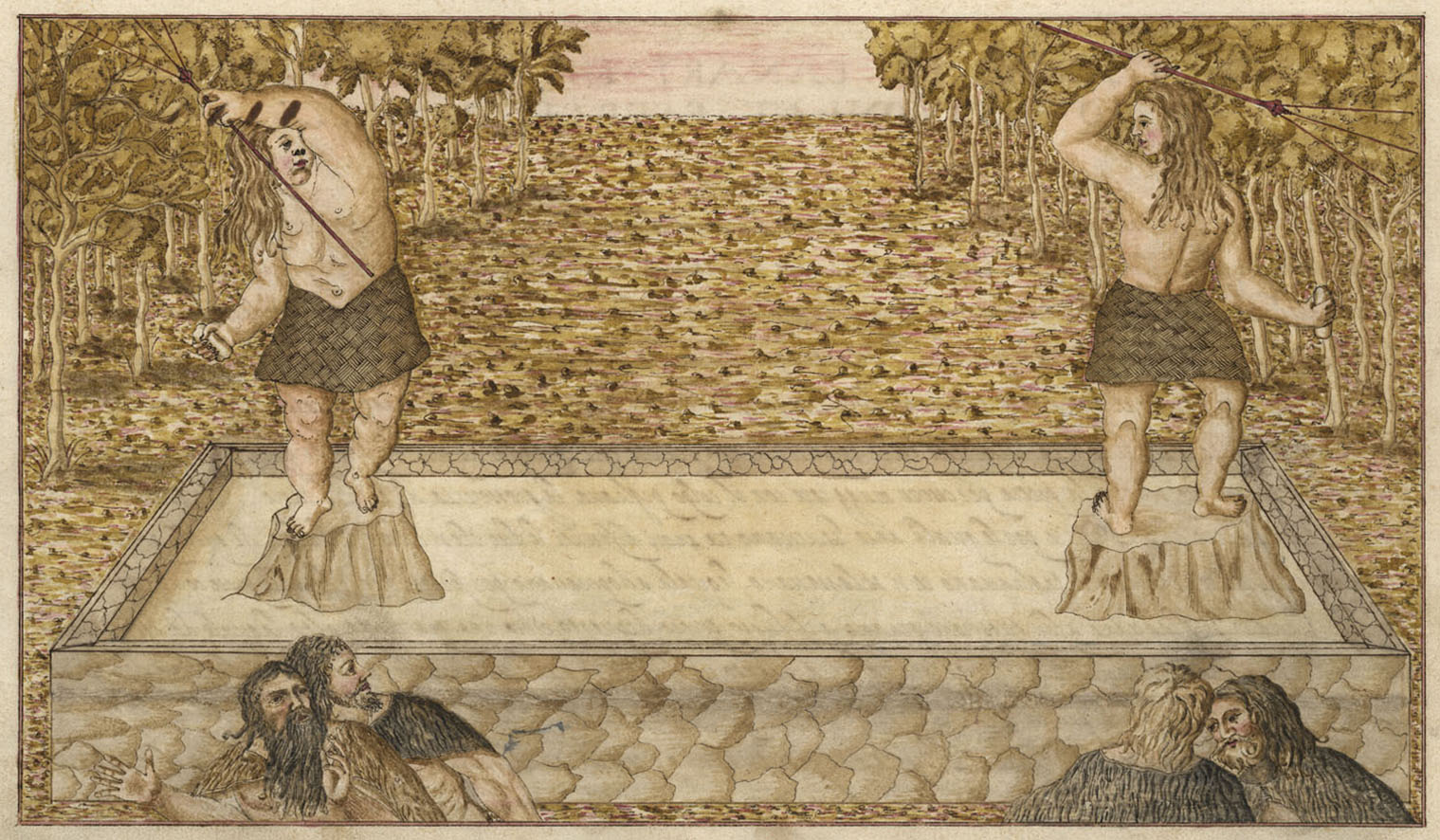 Waffen der Canarios dargestellt Ende des 16. Jahrhunderts durch Leonardo Torriani